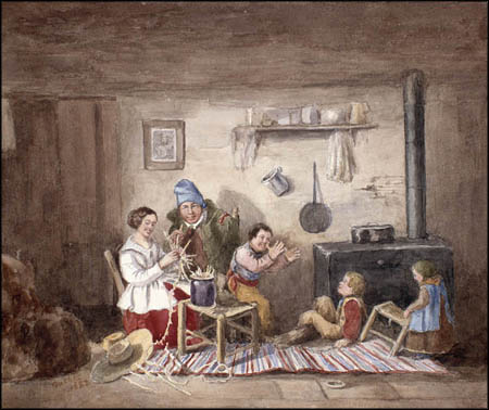 Habitants